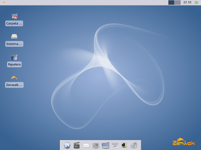 Captura de pantalla del escritorio de Zenwalk 6.0 usando GIMP 2.6